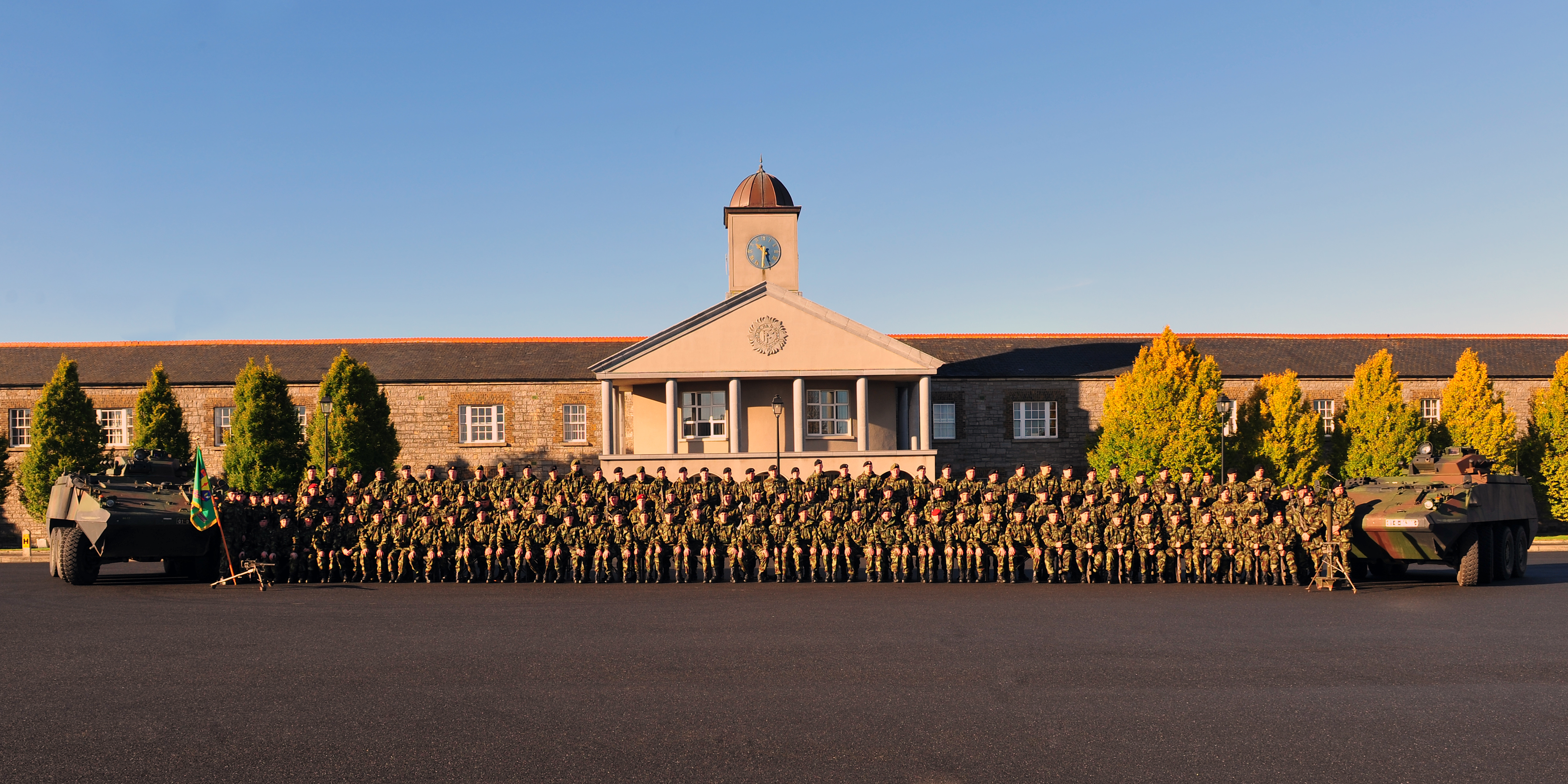 ADA_0058